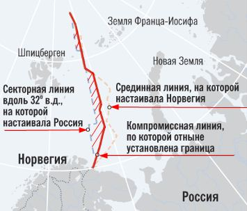 Схема территориальных претензий Норвегии и России и демаркация морской границы Россия-Норвегия в 2010 году